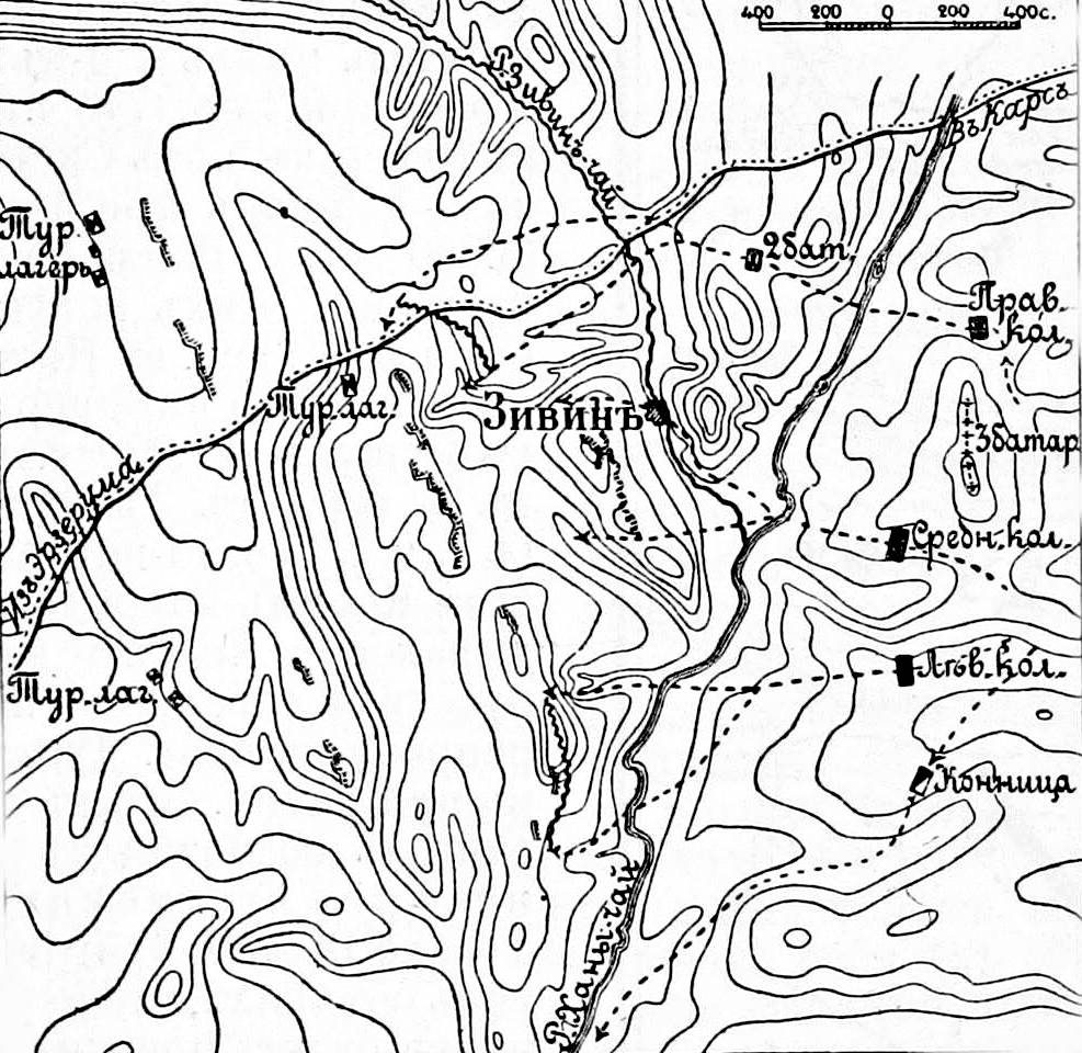 Это изображение было использовано для иллюстрирования статьи «Зивин» опубликованной в десятом томе «Военной энциклопедии», который был издан книгоиздательским товариществом И. Д. Сытина в 1912—1913 гг. в столице Российской империи городе Санкт-Петербурге.